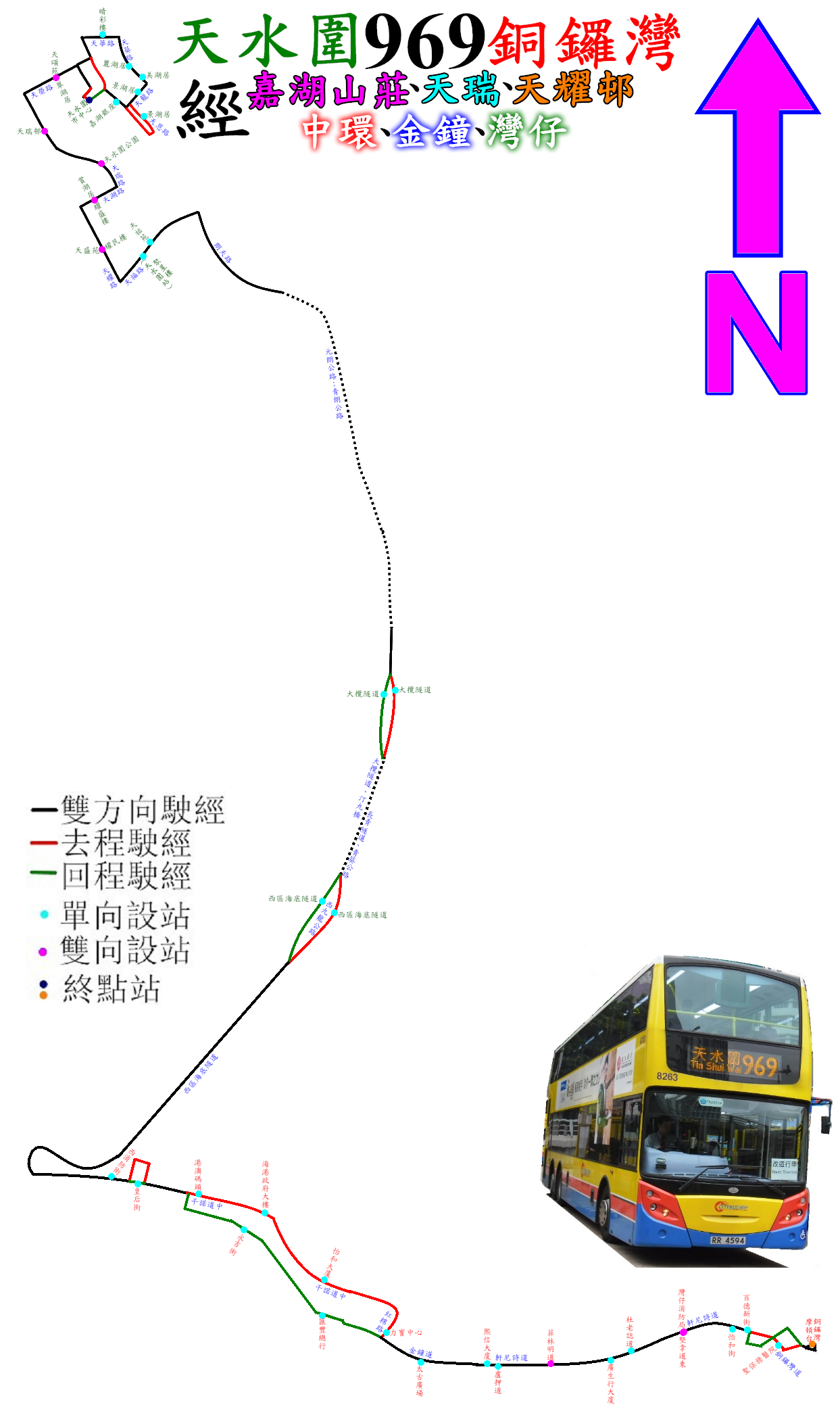 中文（香港）: 過海隧巴967線的走線圖